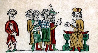 Серб (слева) вместе с саксонцами, франком и евреем перед судьей. Миниатюра из Саксонского зерцала. См. стр. 40 Serbske stawizny (2009) ISBN 978-3-7420-1385-9